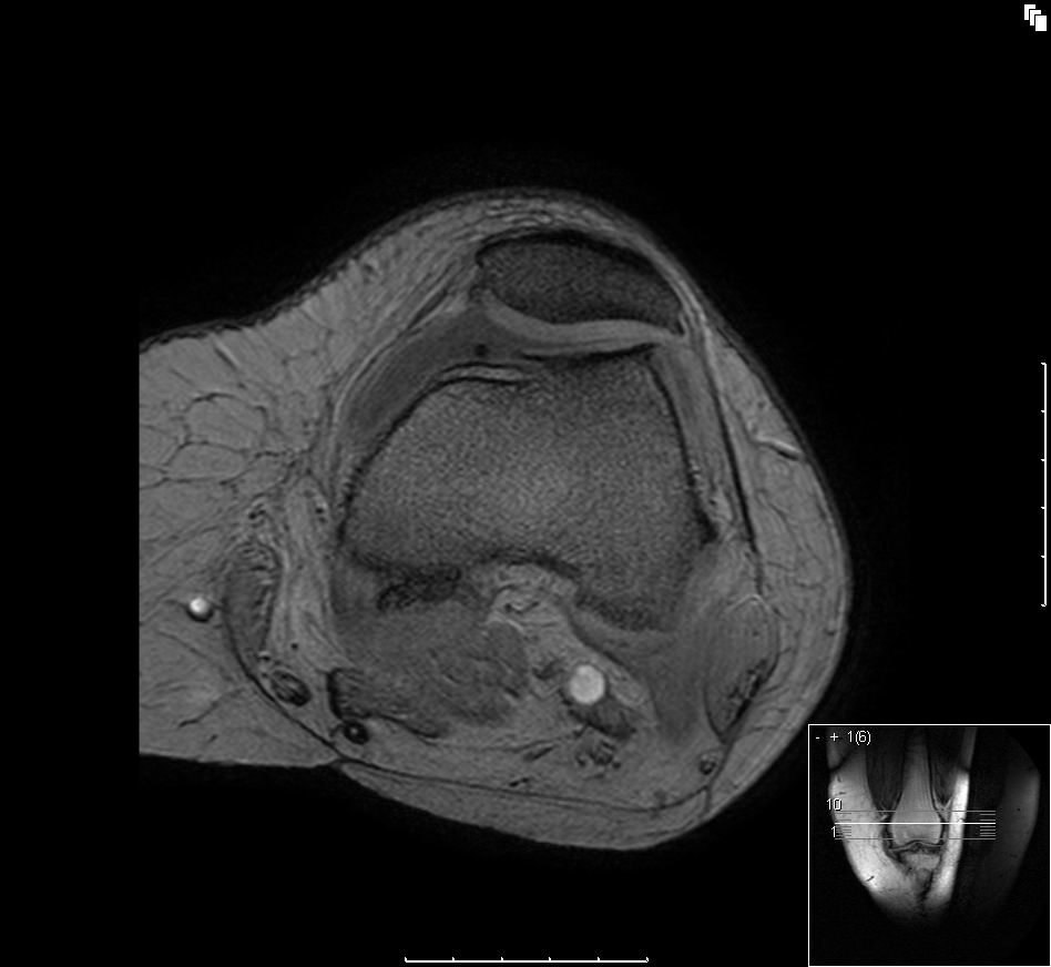 Bildbeschreibung: Femoropatellararthrose, Osteophyten an der Kondylenrinne und an der lateralen Patellakante Quelle: eigene Aufnahme Datum: Autor: User:Scuba-limp